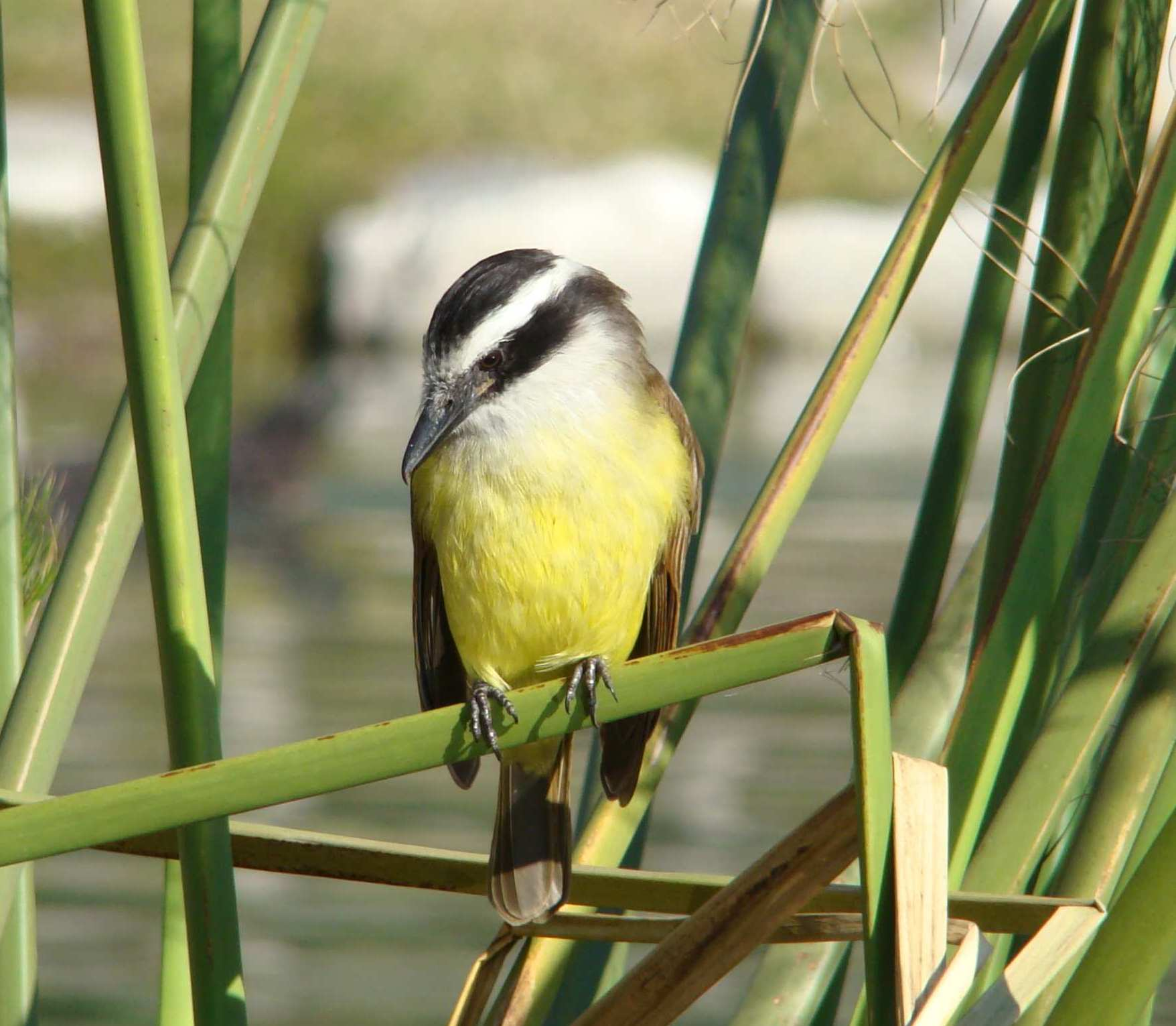 Benteveo